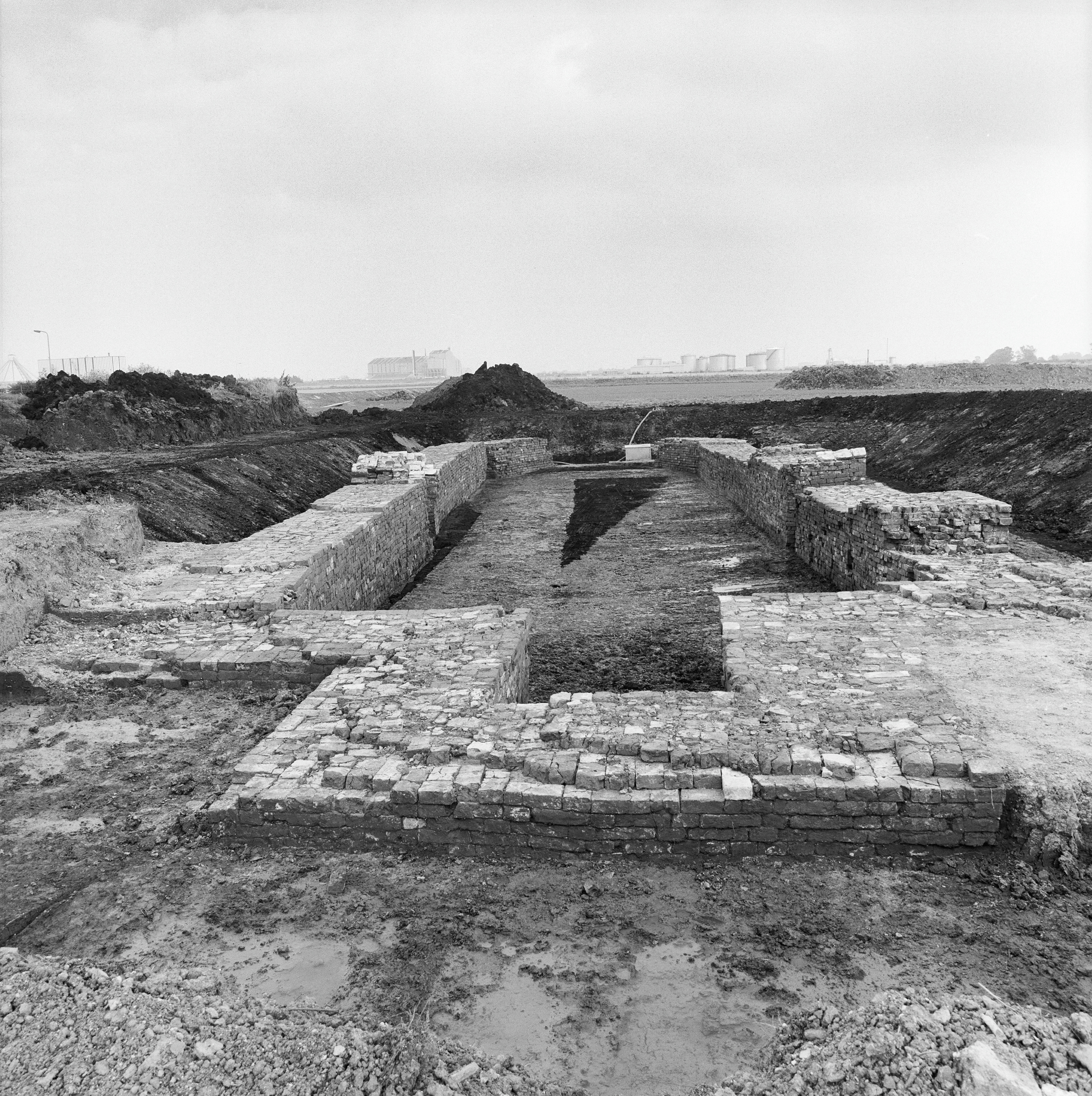 VOORMALIG KLOOSTERKERK: Exterieur OVERZICHT NAAR HET OOSTEN